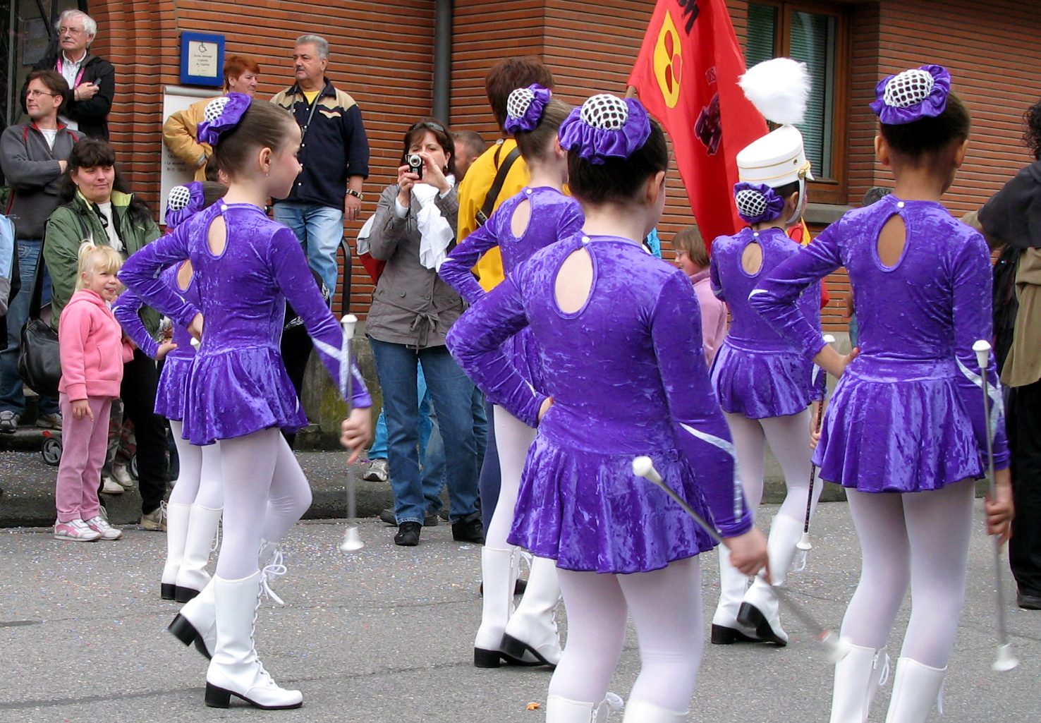 Ham (Somme, France) - Animation festive au centre-ville, un dimanche de printemps. Partis de la place derrière l'Office de Tourisme, sur le côté des vestiges du Château, les groupes composant le cortège commencent à descendre vers le centre-ville, par la rue André Audinot. « Les Valérianes », majorettes de l'assocation des "Amis de Dame Martin" (de Dammartin-en-Goële), précèdent leur géant Mathilde.